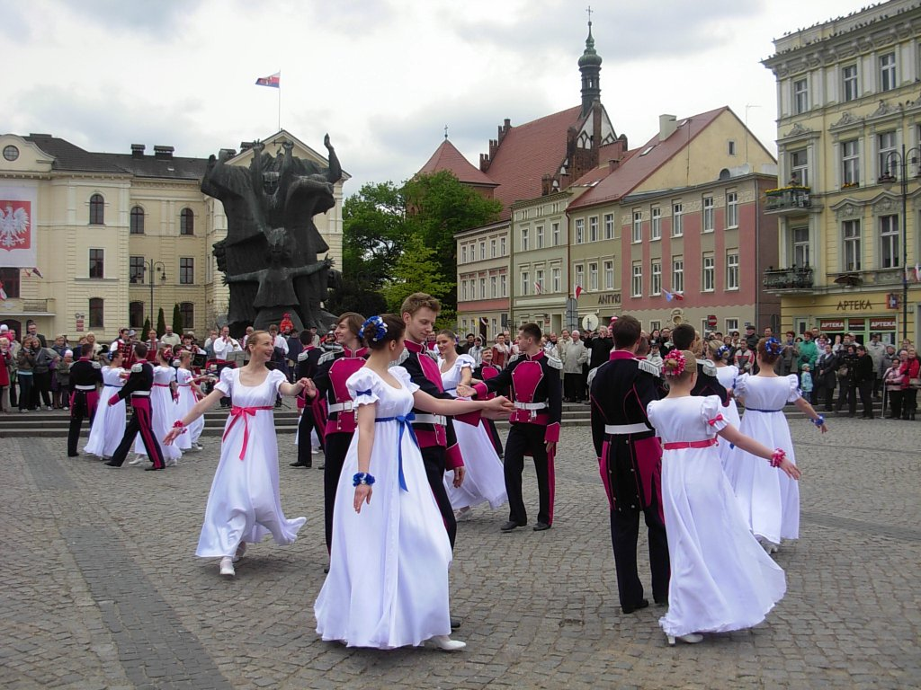 Obchody Święta 3 Maja na Starym Rynku w Bydgoszczy. Taniec zespołu "Ziemia Bydgoska"